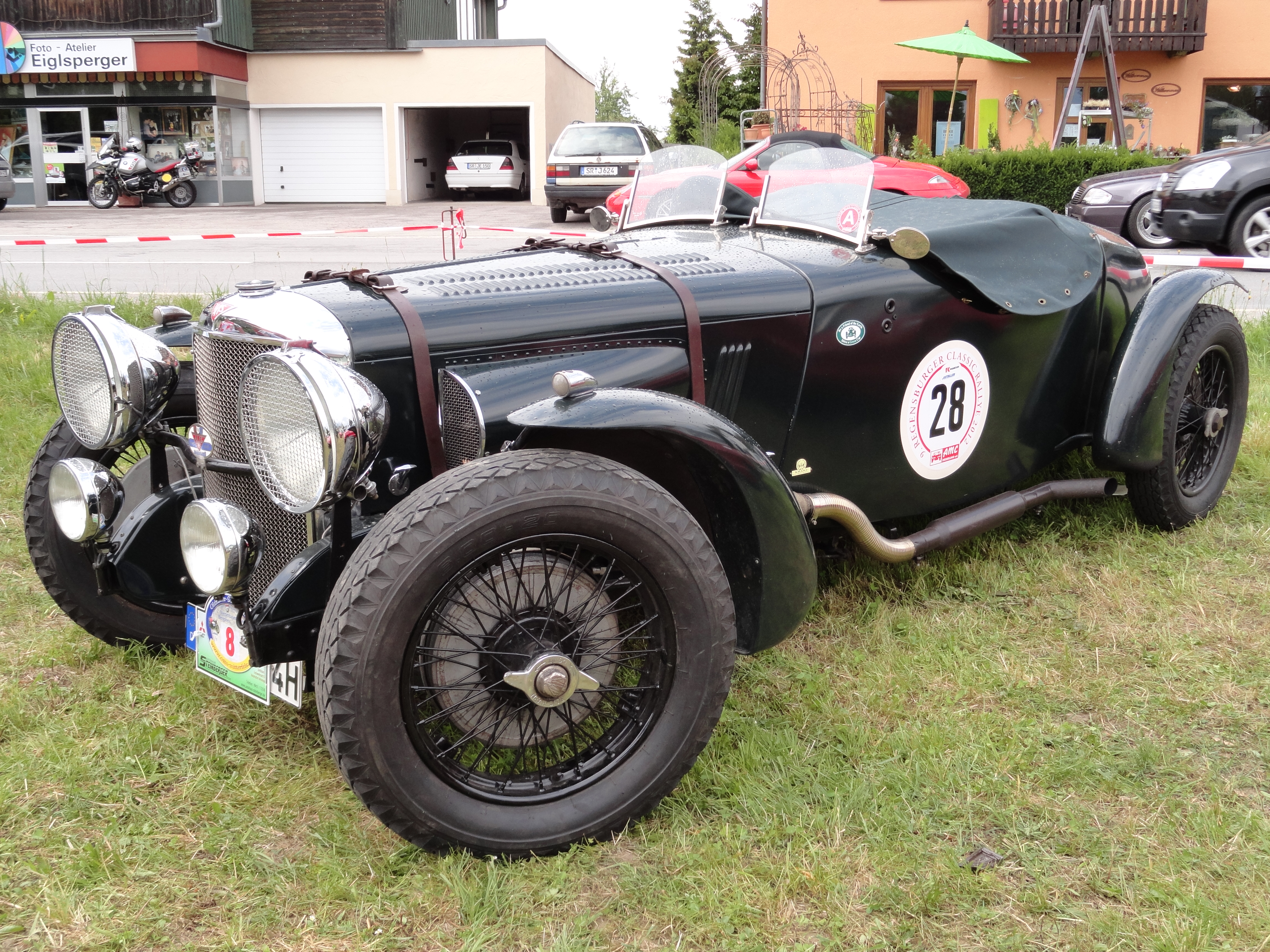 Alvis SPEED 20 SB SPORT